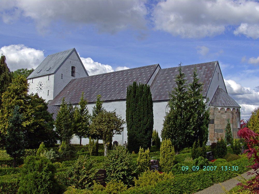 fra sydøst